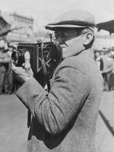 Lauri Pihkala